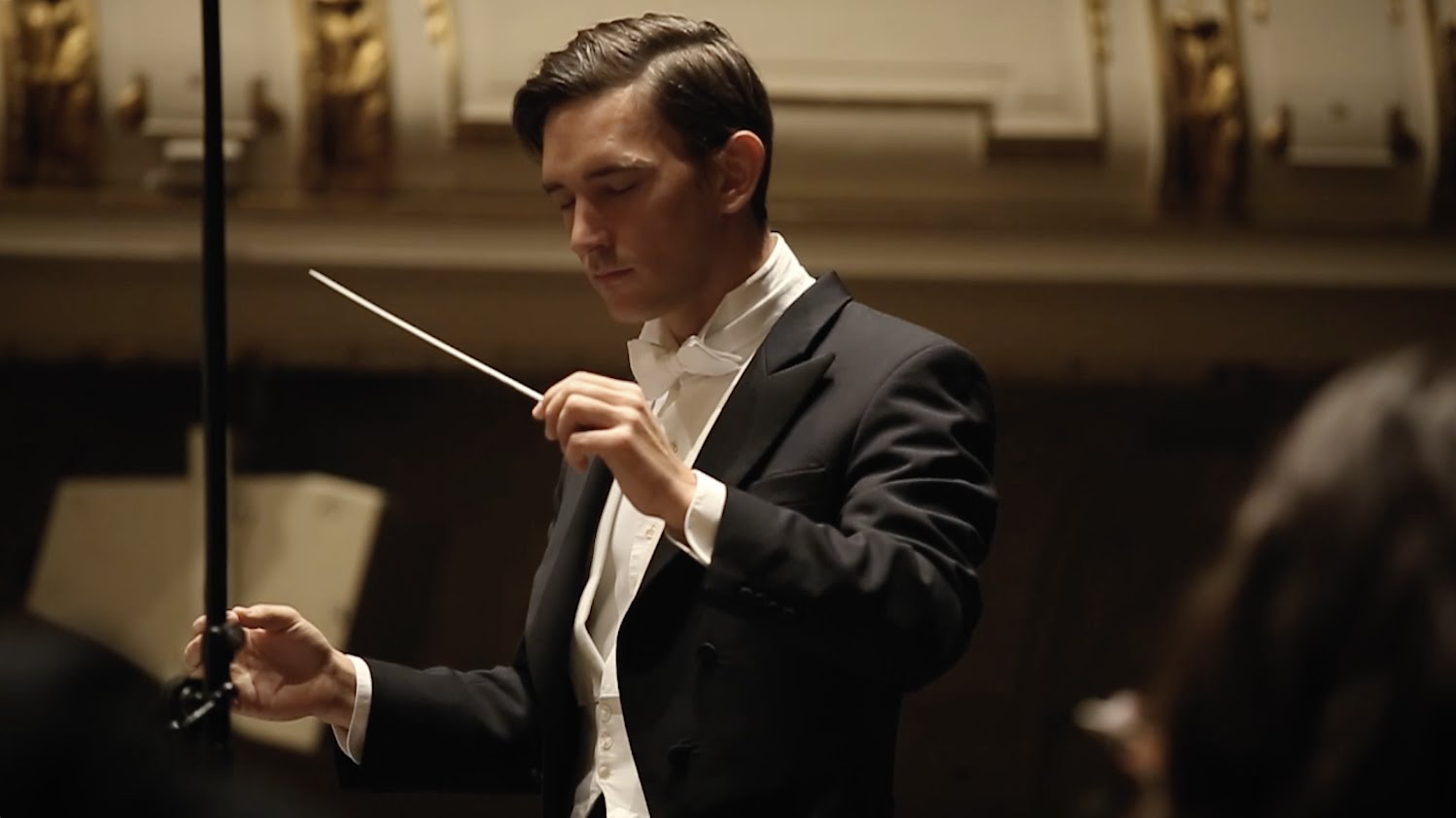 Ericus Polz, gregis canentium dux austriacus